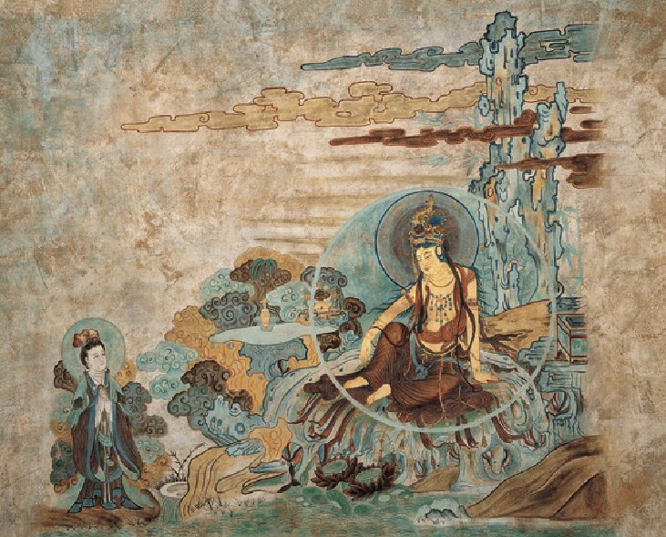 榆林第二窟《水月觀音圖》